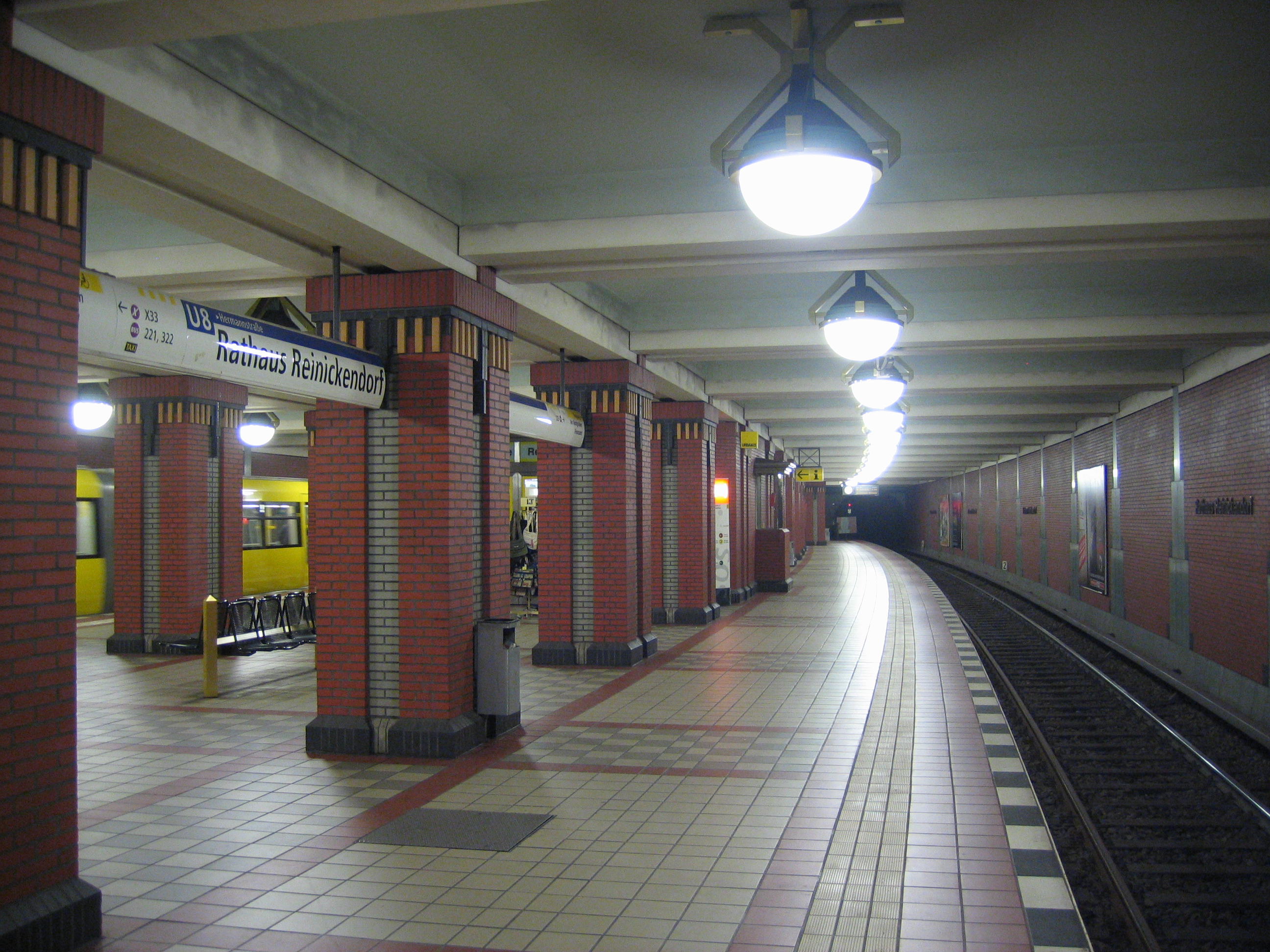 U-Bahnhof Rathaus Reinickendorf, Berlin